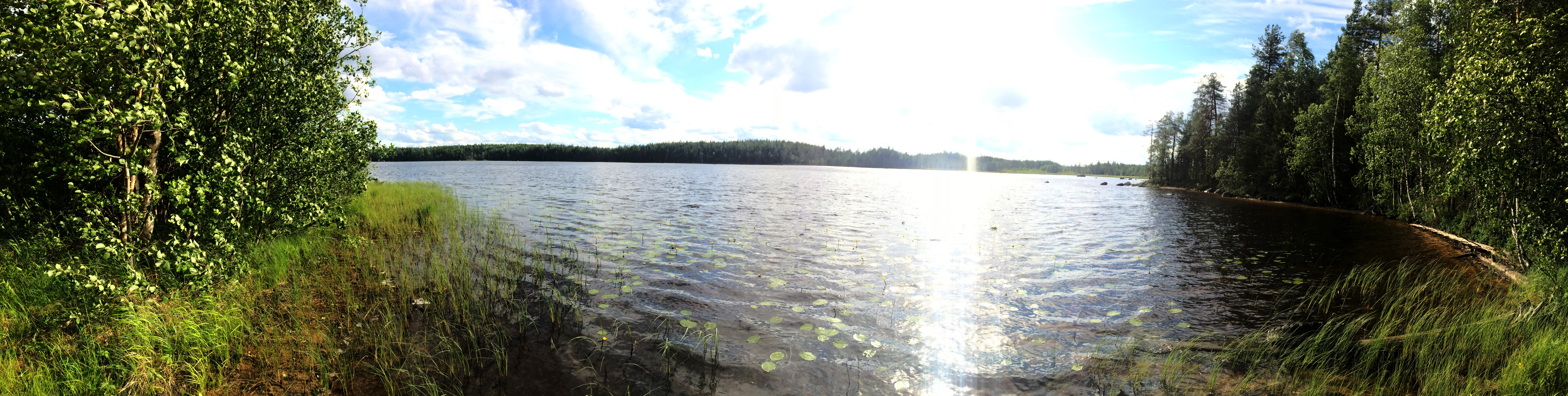 Юдозеро